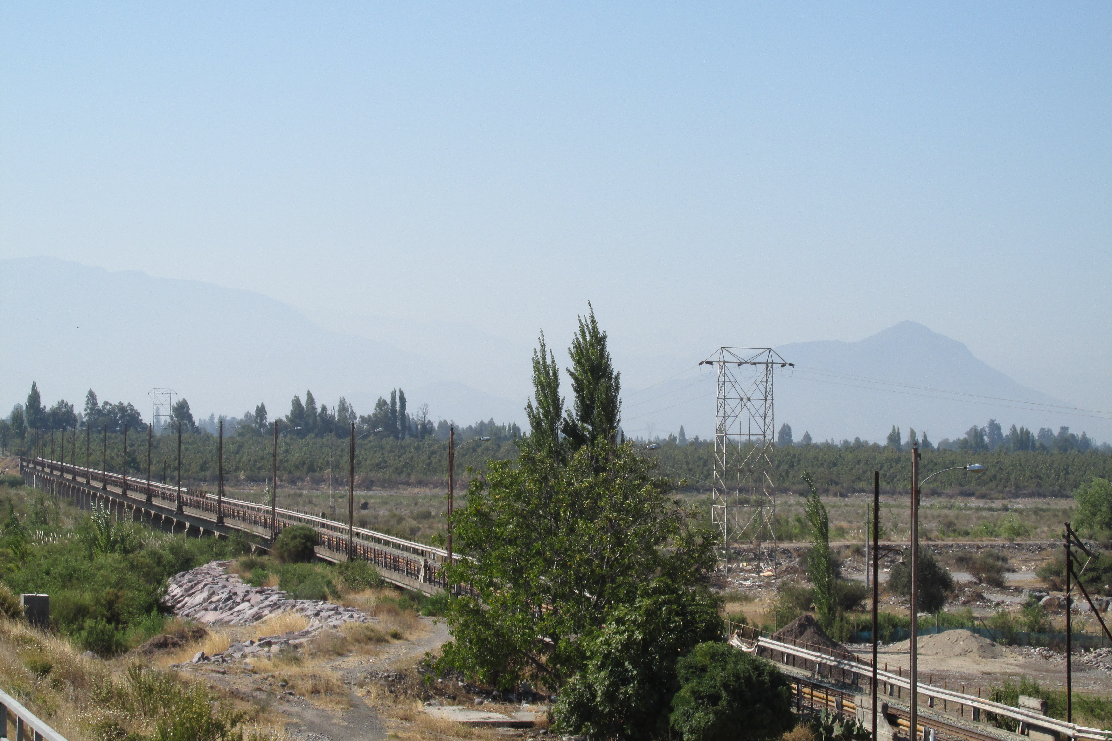 Puente Ferroviario de Lonquén comuna de Talagante Chile